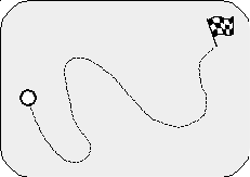 Le schéma montre le problème d'accessibilité